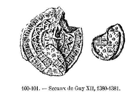 Guy XII de Laval